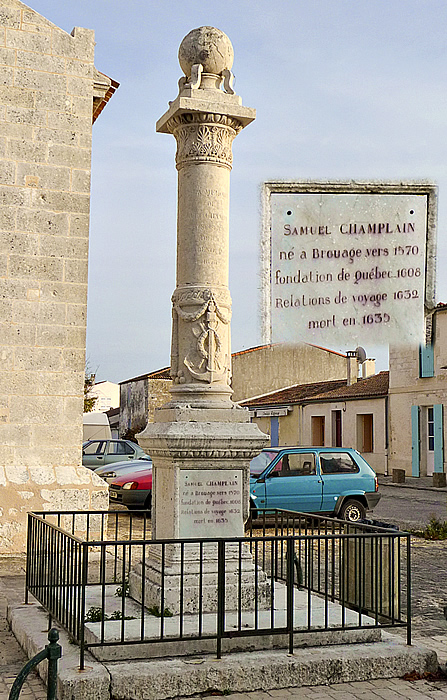 Monument à la mémoire de Champlain devant l'église de Brouage - Charente Maritime